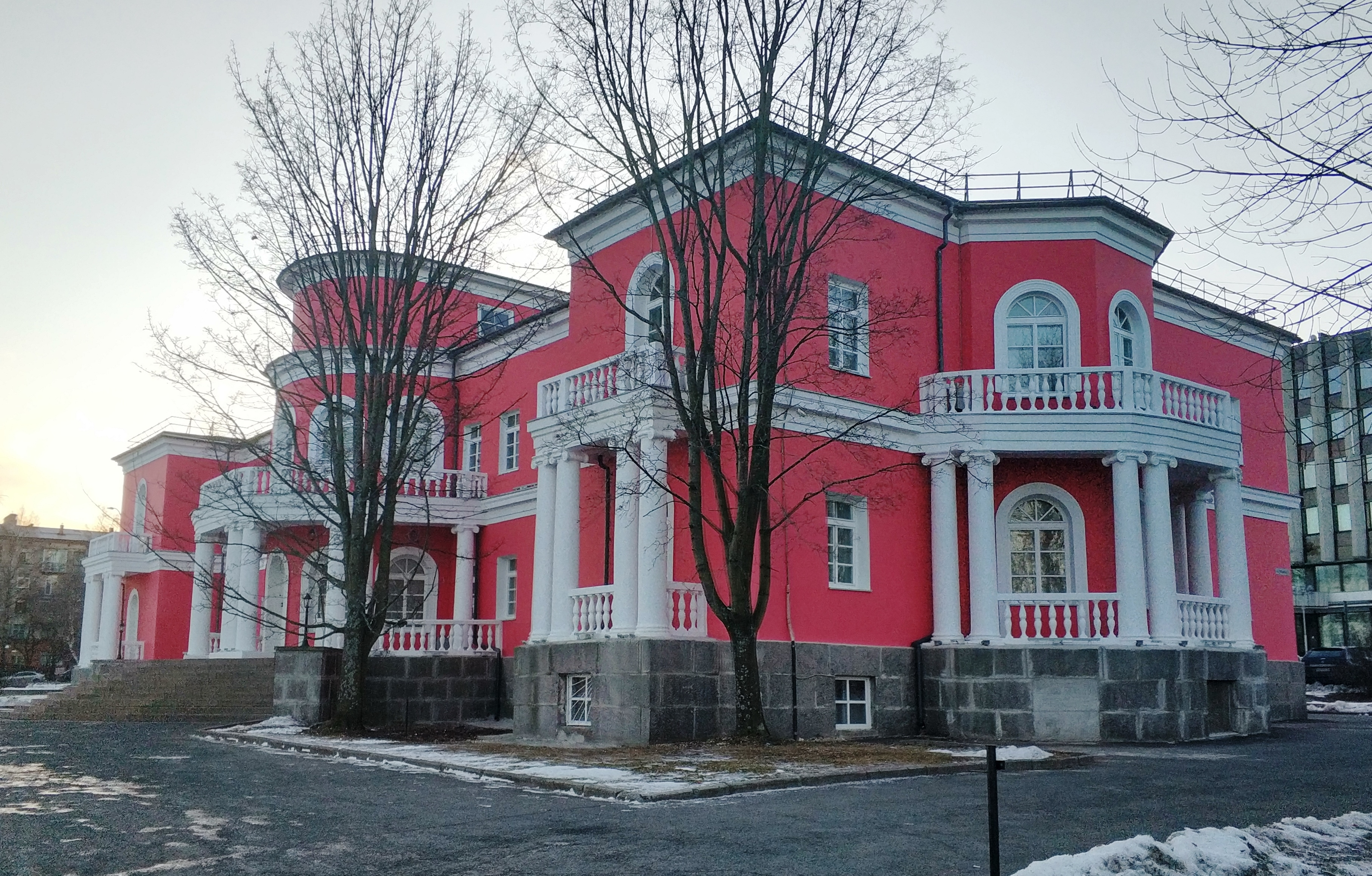 Здание бывшего Дворца Пионеров в Петрозаводске на Онежской набережной в Петрозаводске. Построено в 1950-е годы по проекту архитектора Ростислава Борисовича Корнева. Ныне ЗАГС.